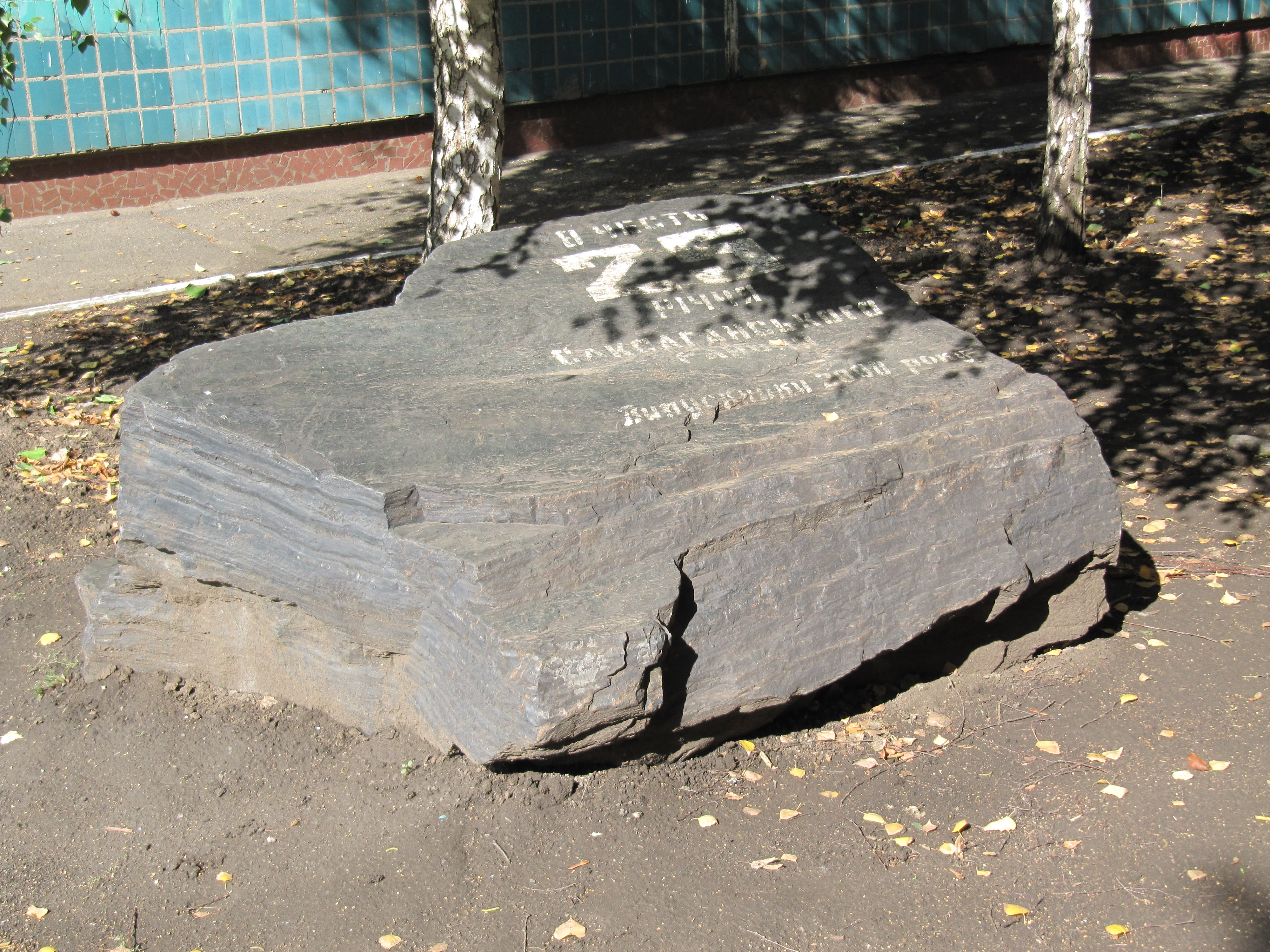 Кам'яна брила за написом білою фарбою. Текст напису: "В честь 25-річчя Саксаганського району. Випускники 2000". мкрн. Сонячний, на території школи №118, м. Кривий Ріг